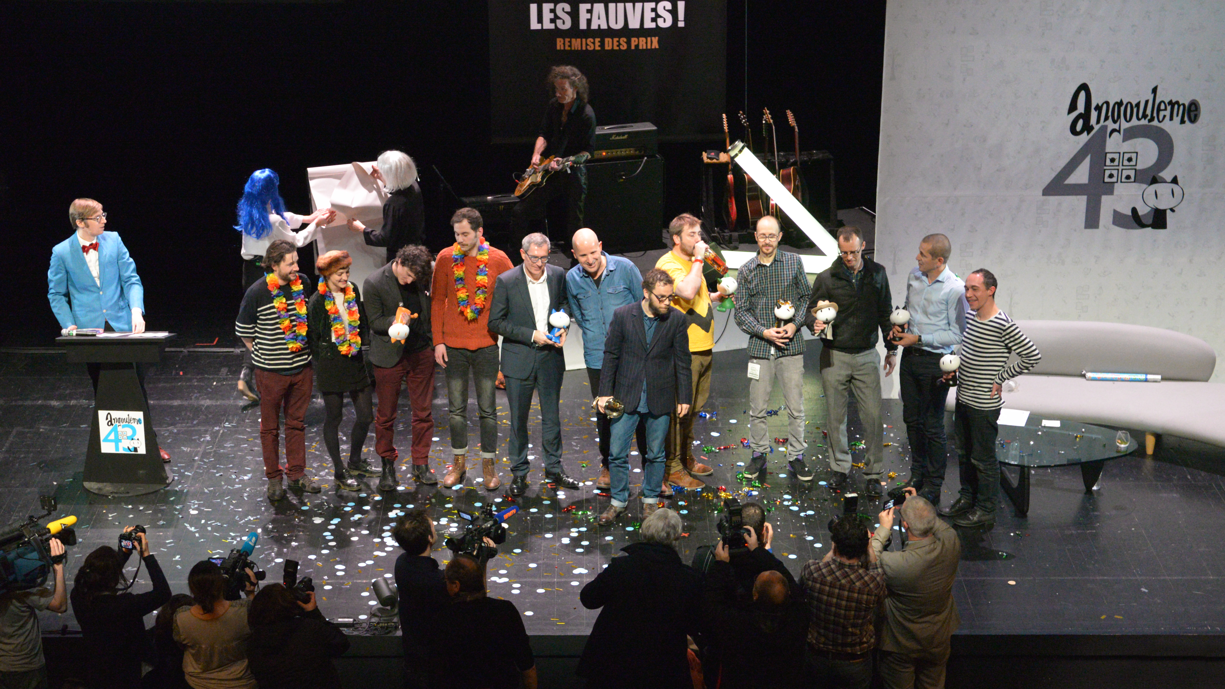 Les lauréats à la fin de la cérémonie de remise des prix, Festival International de la Bande Dessinée d'Angoulême 2016.